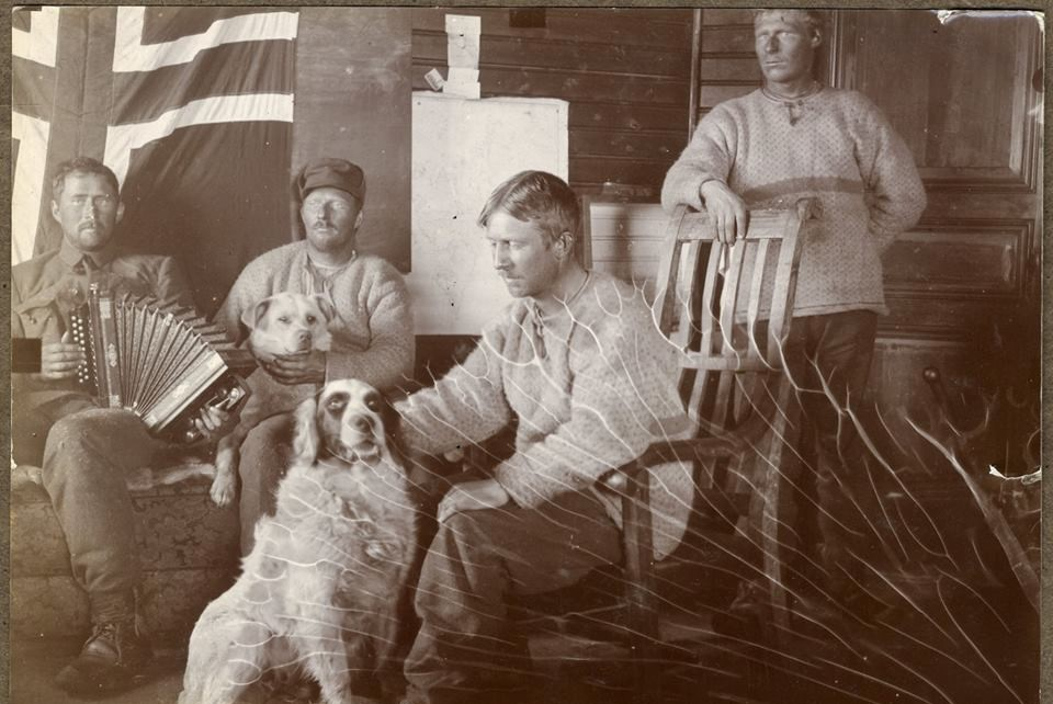 Fra venstre fangstmannen & ishavsskipper Daniel Nøis, fangstmannen Johan Nilsen Nøis, fangtsmannen Hilmar Nøis og sittende foran kaptein & polarforsker Arve Staxrud. Bildet er tatt i forbindelse med redningsaksjonen på Spitsbergen etter Schrøder - Stranz 1912-13. Brødrene Daniel Nøis og Johan Nilsen Nøis var onkler til Hilmar Nøis , og tok han med på på sin første fangstovervintering i 1909-10 sesongen.